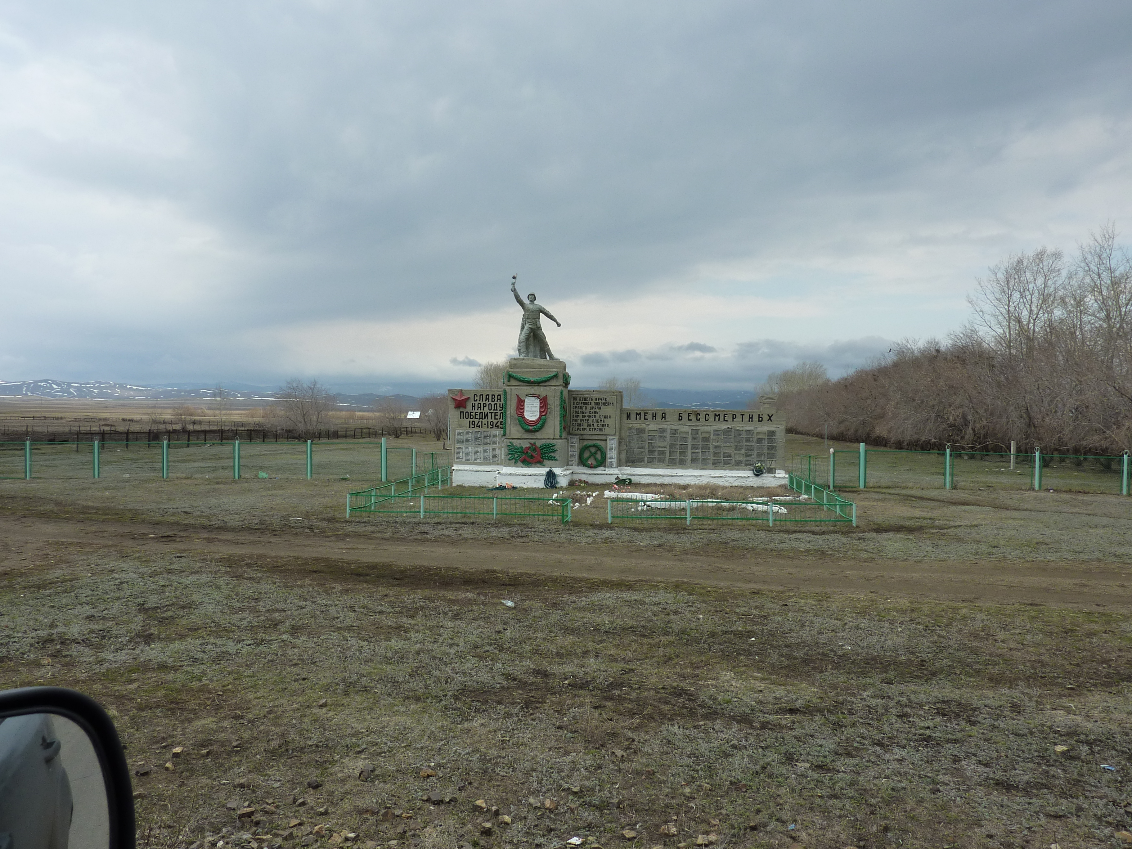 War Memorial in village Mikhaylovka (Abzelilovsky District)(Военный мемориал)